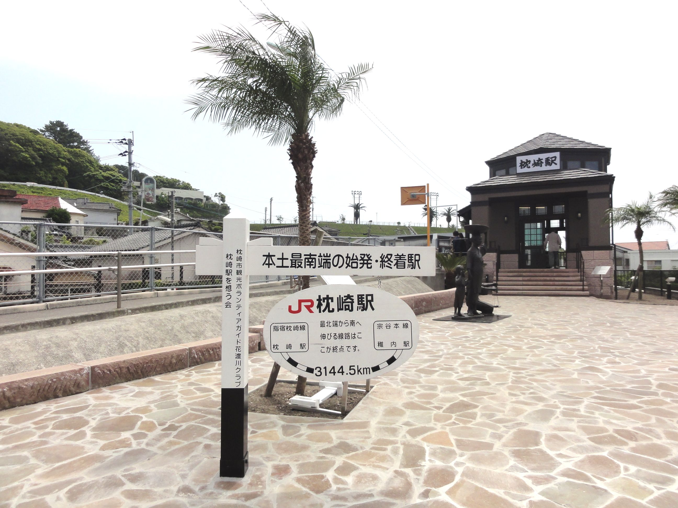 枕崎駅